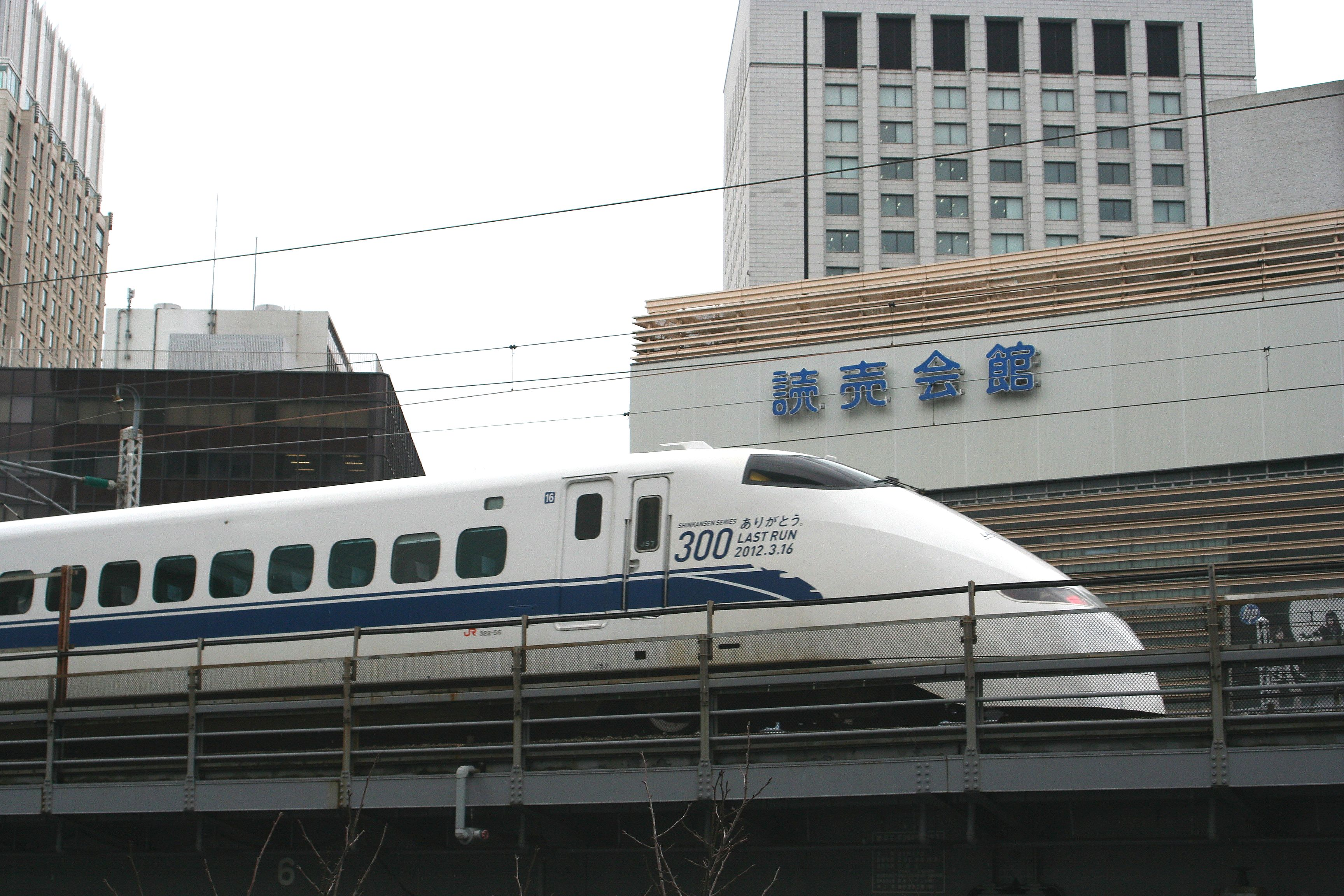 新幹線300系